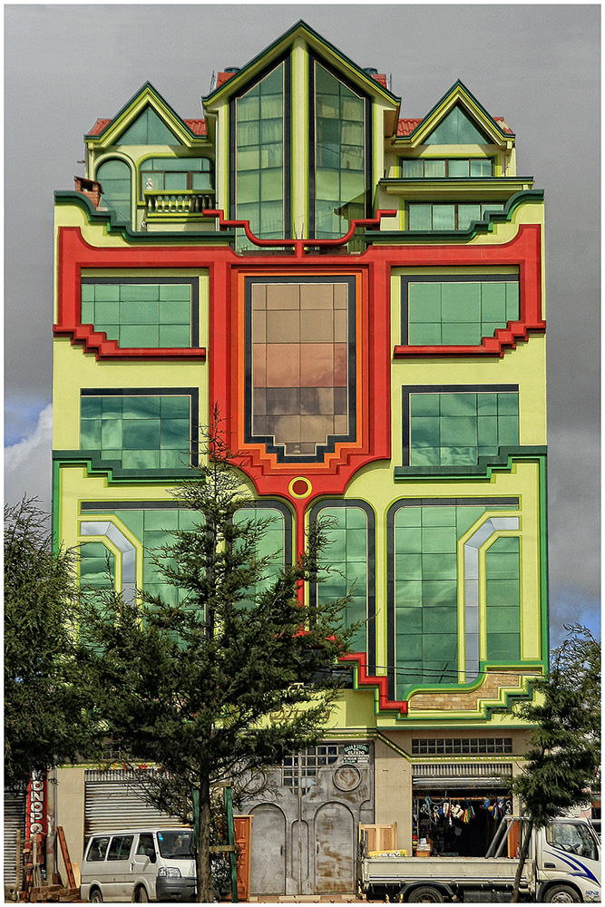 Nuevo estilo de arquitectura en La Paz, explosión de colores y formas son preferencia popular en las nuevas edificaciones.